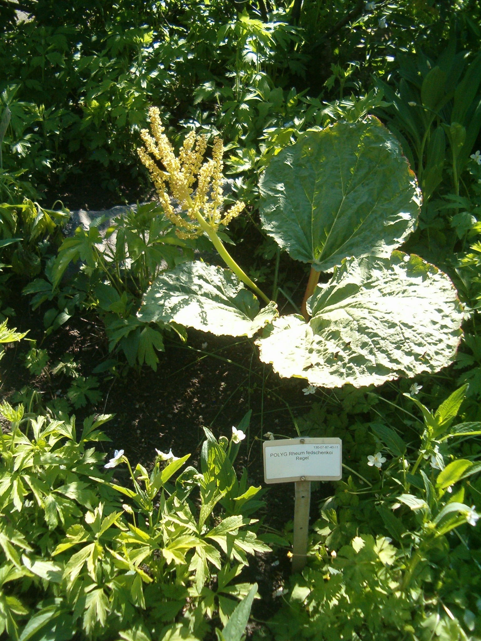 At Botanical Gardens Berlin-Dahlem Species Rheum fedtschenkoi